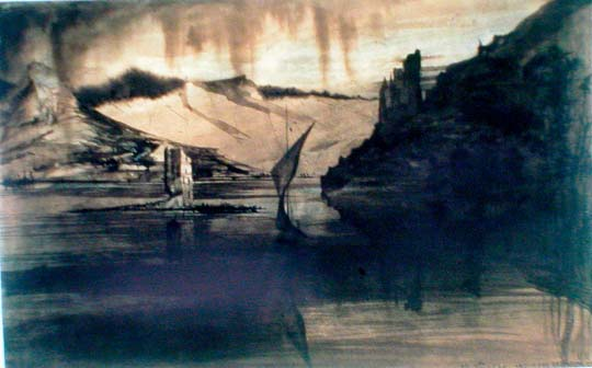 "La tour des rats", Victor Hugo 1840/47. Crayon graphite, encre brune, pinceau, plume et espèce d'aiguille (28,5 x 44,8 cm), Maison de Victor Hugo (nº 12).